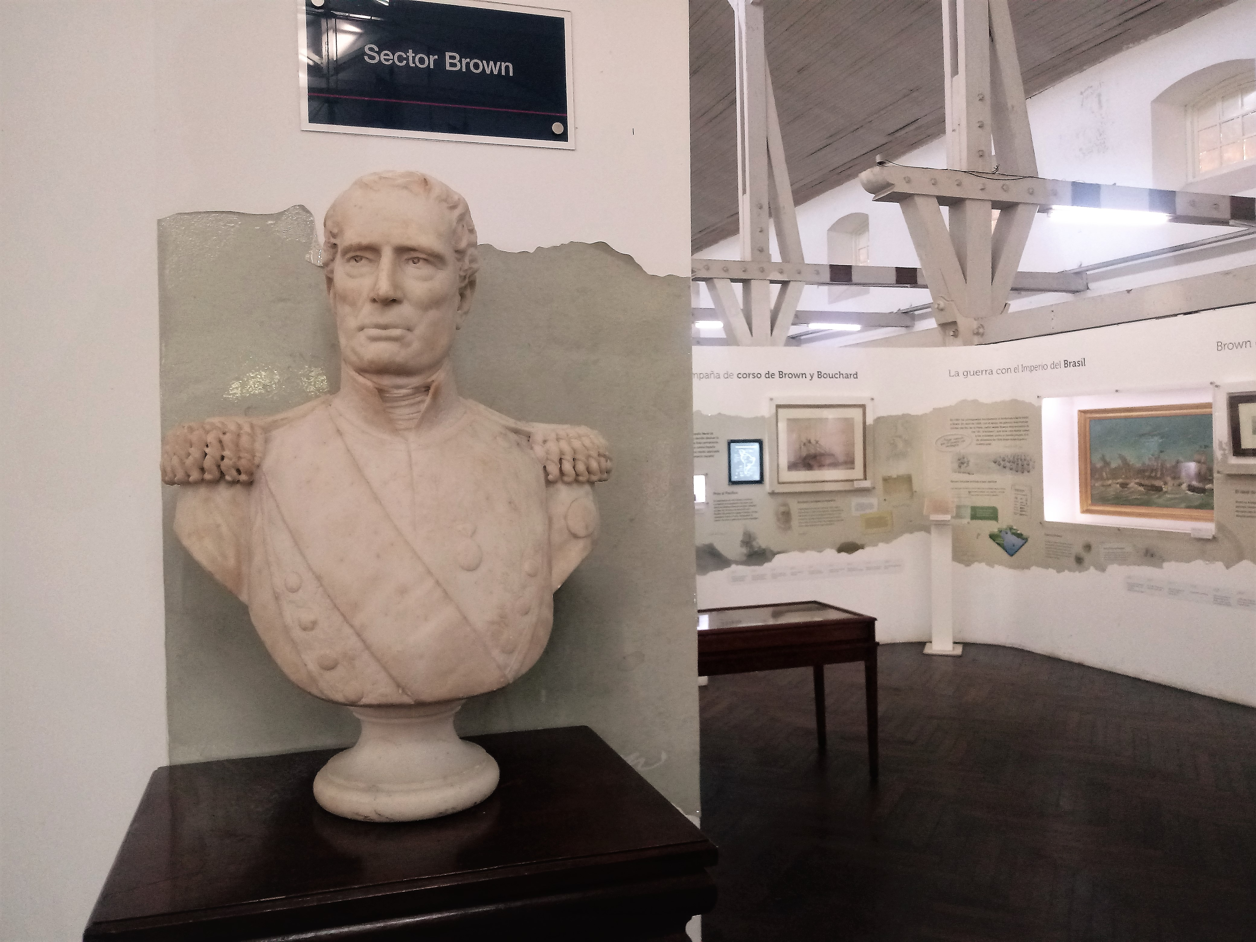 Sector Brown en la Sala Independencia del Museo Naval de la Nación de Tigre.